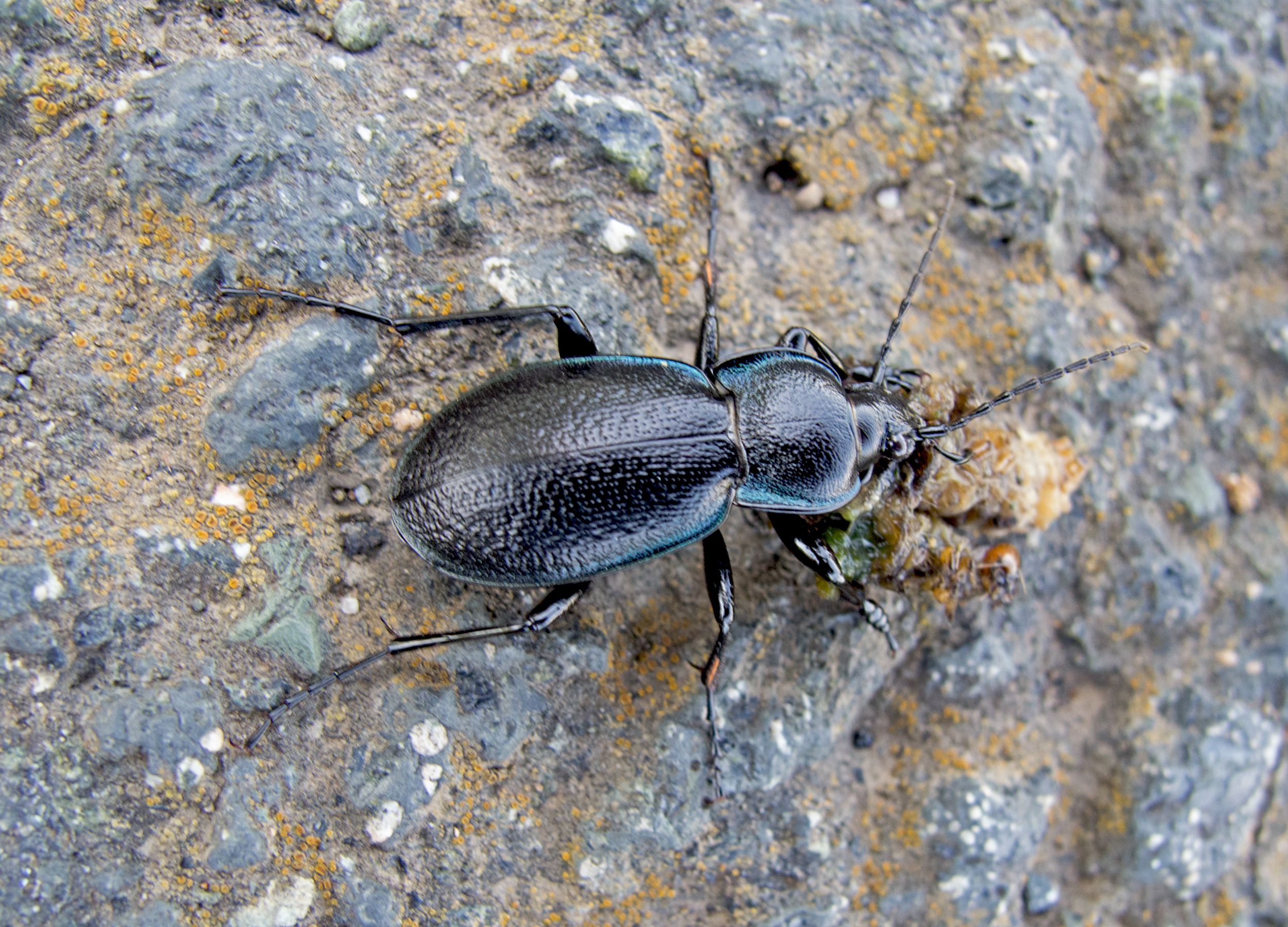 Carabus montivagus is a species of black coloured beetle from Carabidae family, that can be found in Albania, Bulgaria, Greece, Hungary, Italy, Romania, Slovakia, all of the republics of the former Yugoslavia, and European Turkey. Most of carabus genus are nocturnal, predatory beetles that feed on snails, earthworms and caterpillars. Carabus montivagus - это вид жуков семейства Carabidae, его можно найти в Албании, Болгарии, Греции, Венгрии, Италии, Румынии, Словакии, всех республиках бывшей Югославии и на европейской части Турции. Большинство карабусов являются ночными хищниками, которые питаются улитками, дождевыми червями, гусеницами, личинками.